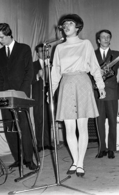 A Metró együttes koncertje. Rédey Gábor, Zalatnay Sarolta, Zorán Sztevanovity.